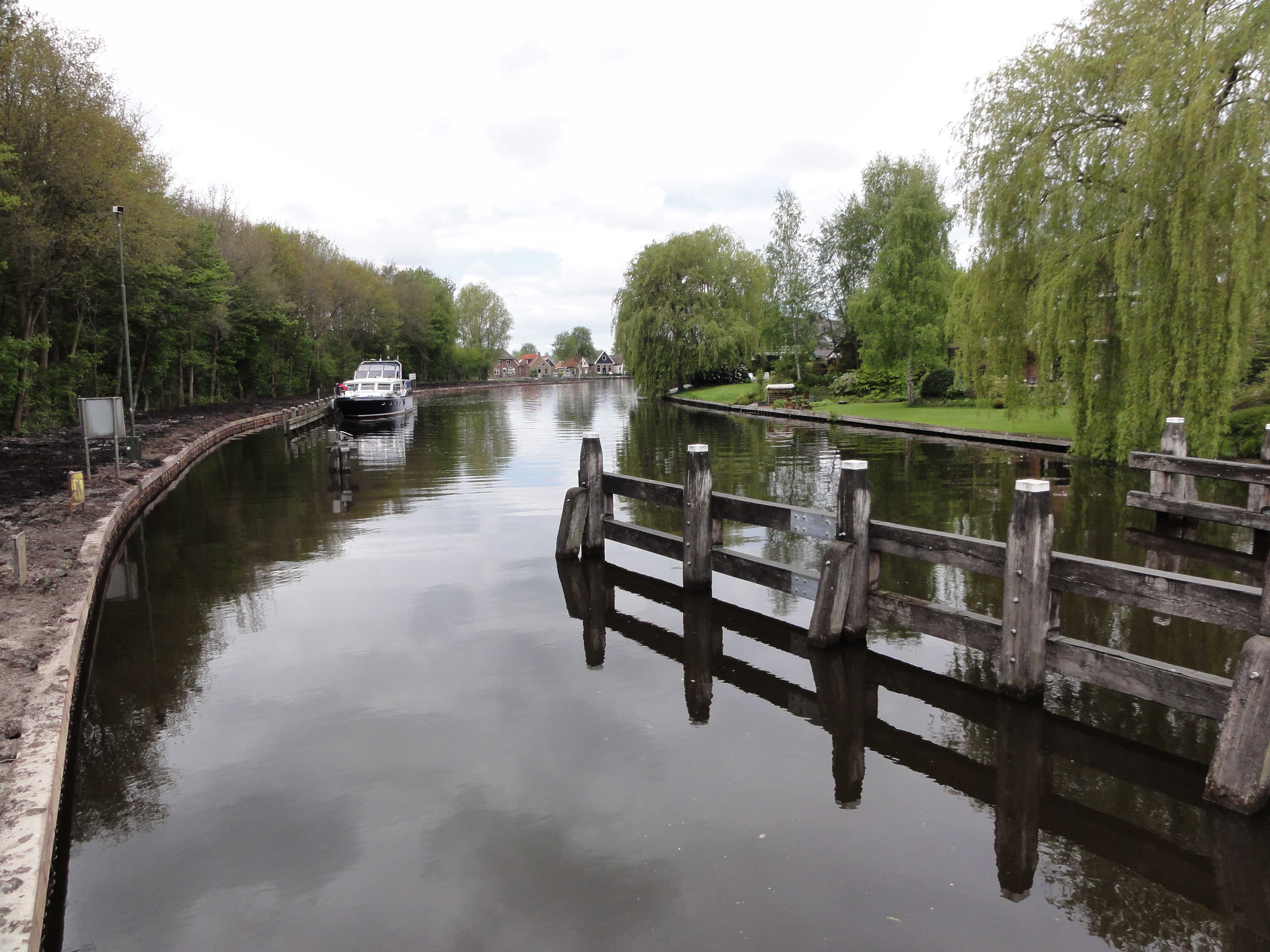 Ossenzijl met het kanaal van Steenwijk naar Ossenzijl